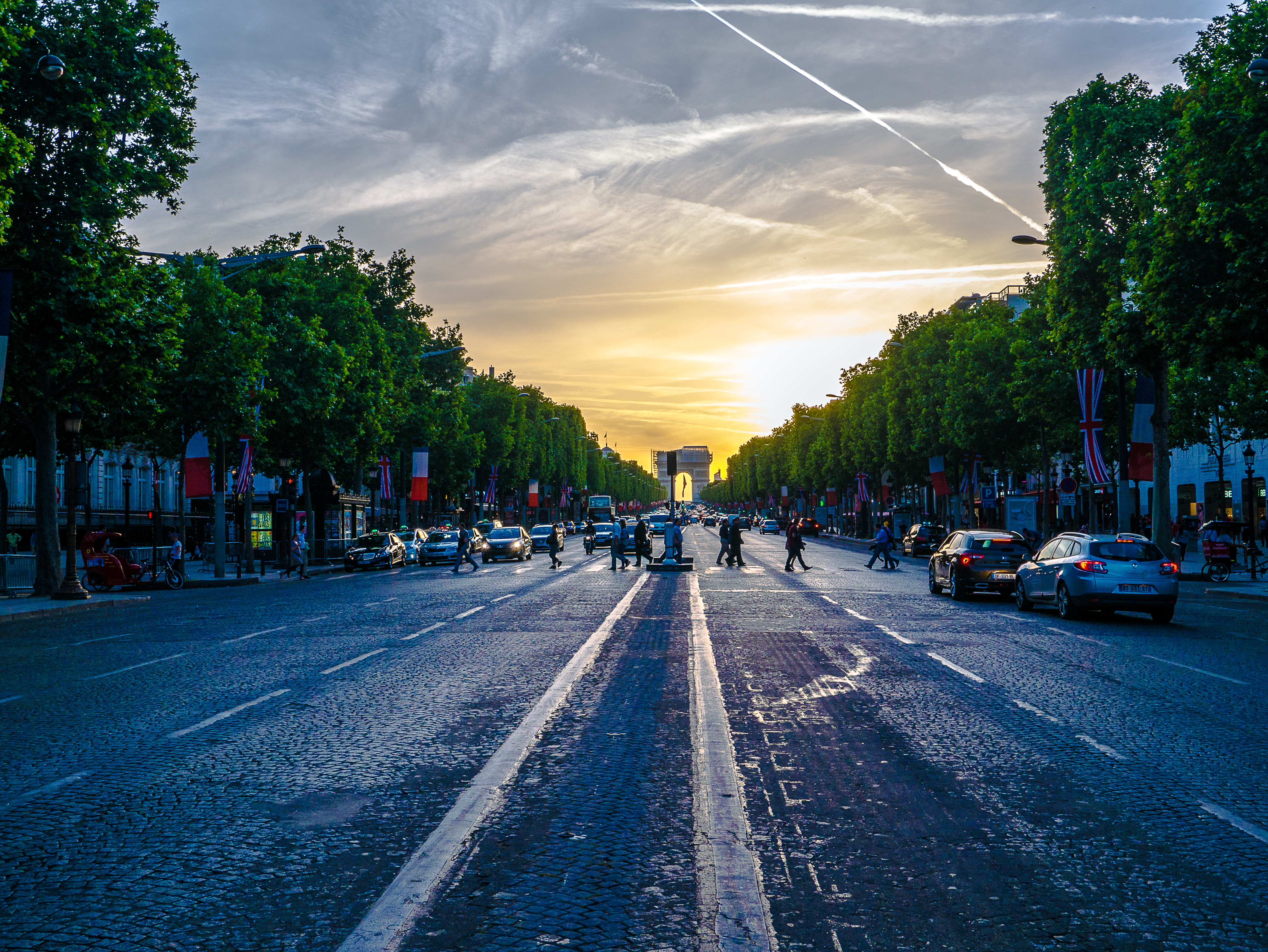 Les Champs Elysées et l'Arc de Triomphe - Paris - 6 juin 2014